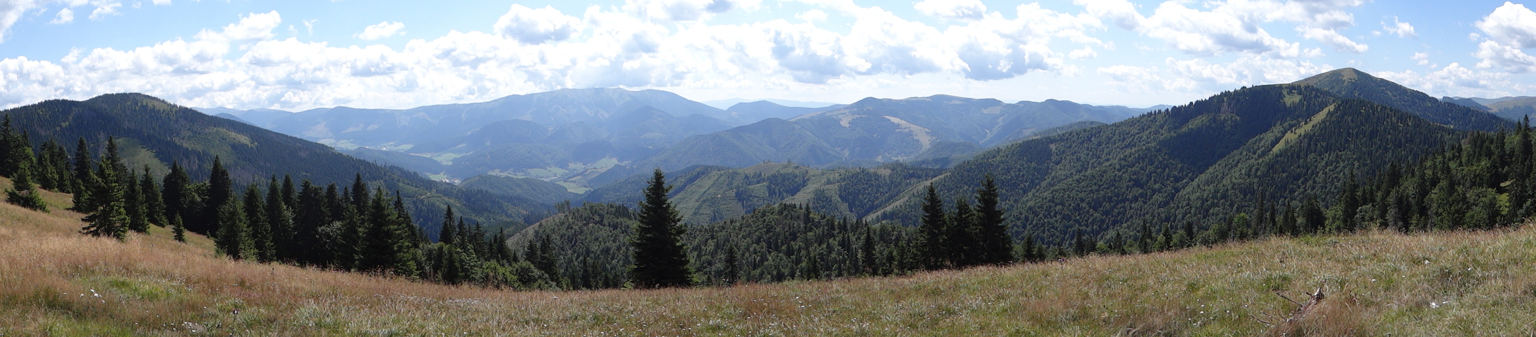 Views from Skalná Alpa